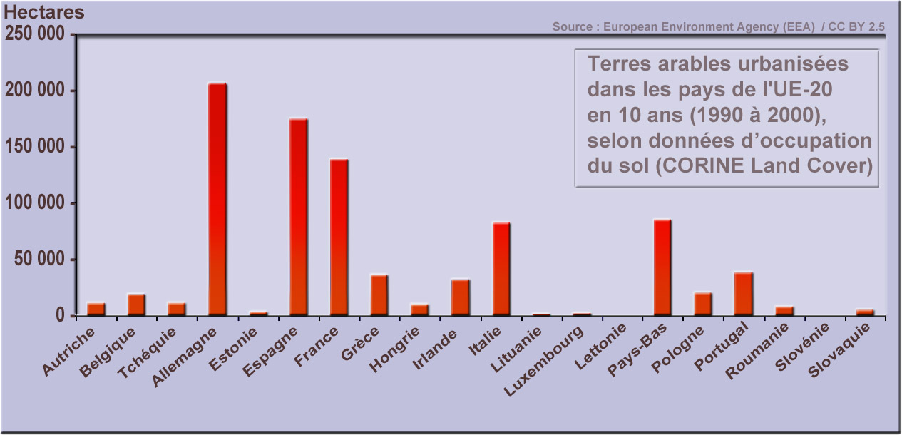 Terres arables urbanisées dans les pays de l'UE-20 en 10 ans (1990 à 2000), selon données d’occupation du sol (CORINE Land Cover) source : Agence européenne de l'environnement, (donnée en licence CC-by-2.5) Losses of agricultural areas to urbanisation, consulté 2011-10-21